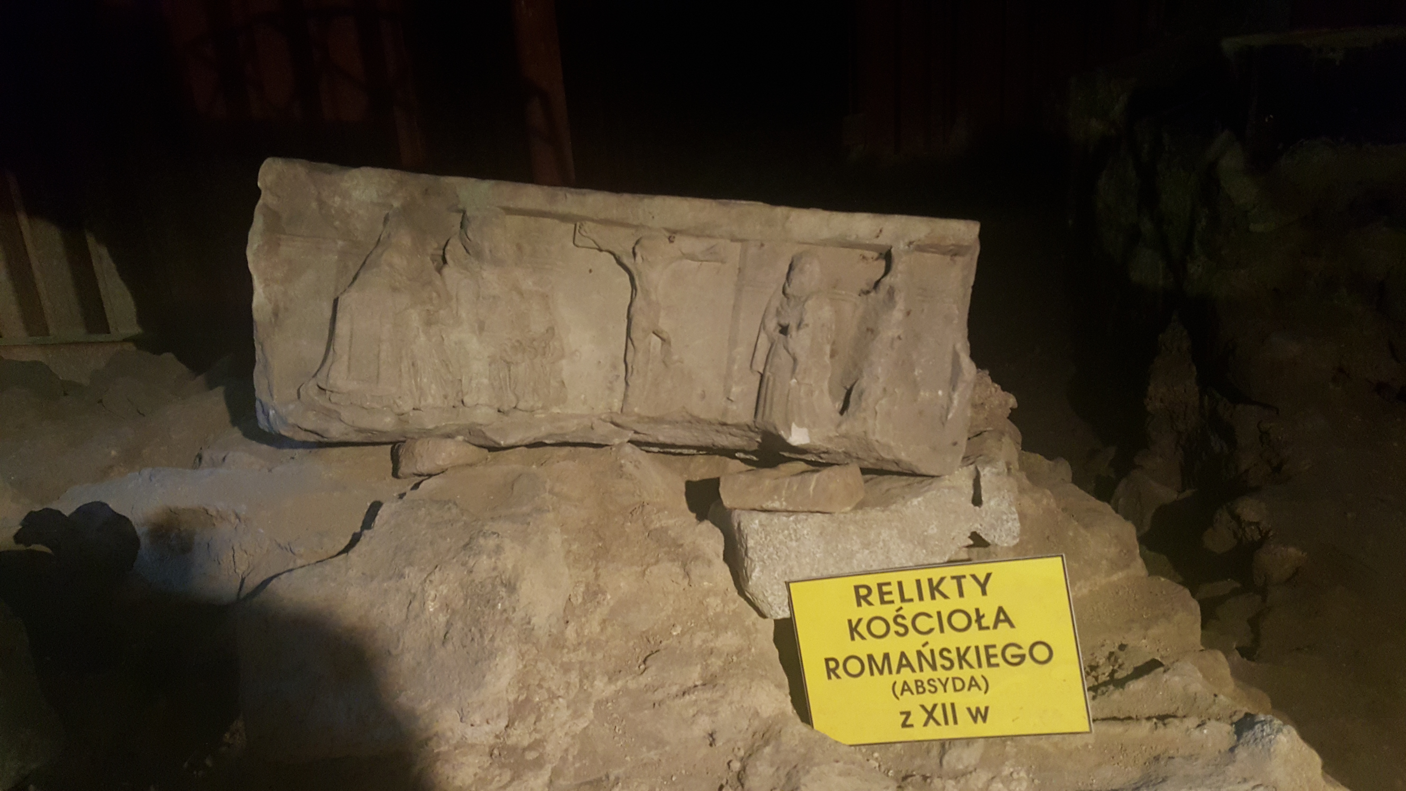 Kościół pw. Nawiedzenia NMP Ślęża - krypta